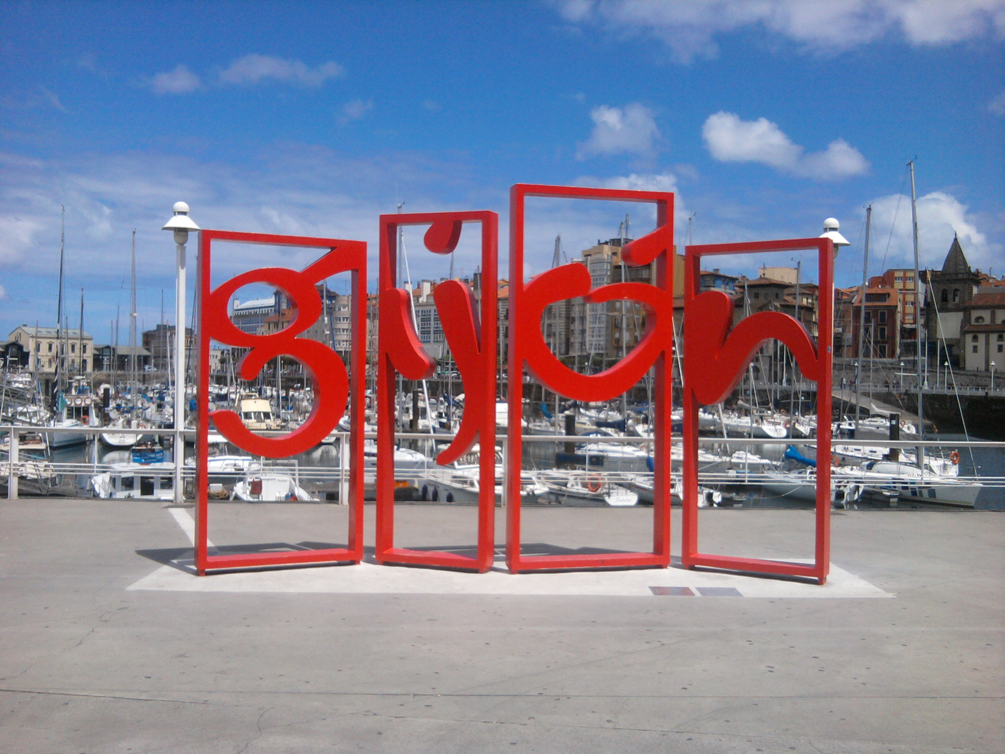 Las "letronas" de Gijón, junto al puerto deportivo.